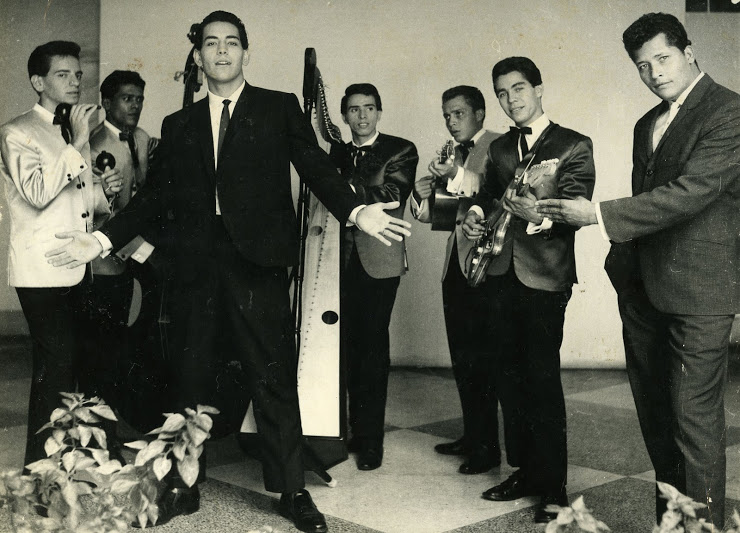 Conjunto Fantasia venezuela.jpg